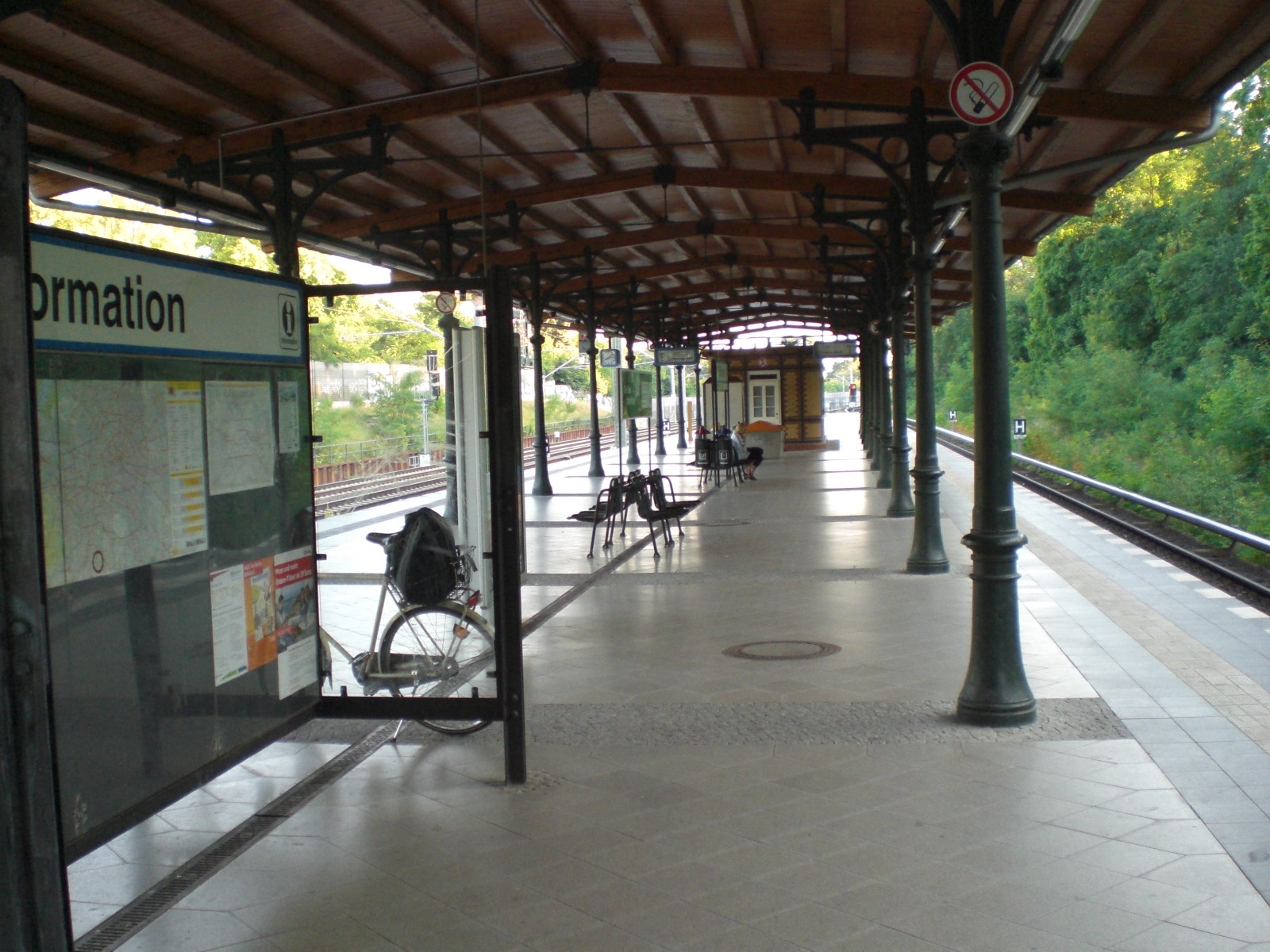 S-Bahnhof Berlin-Südende, Bahnsteig (Richtung Lichterfelde)